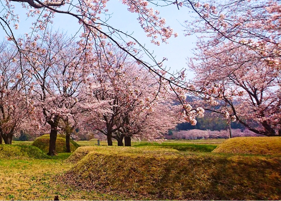 Mizushina kofun, Jōetsu, Niigata, Japan